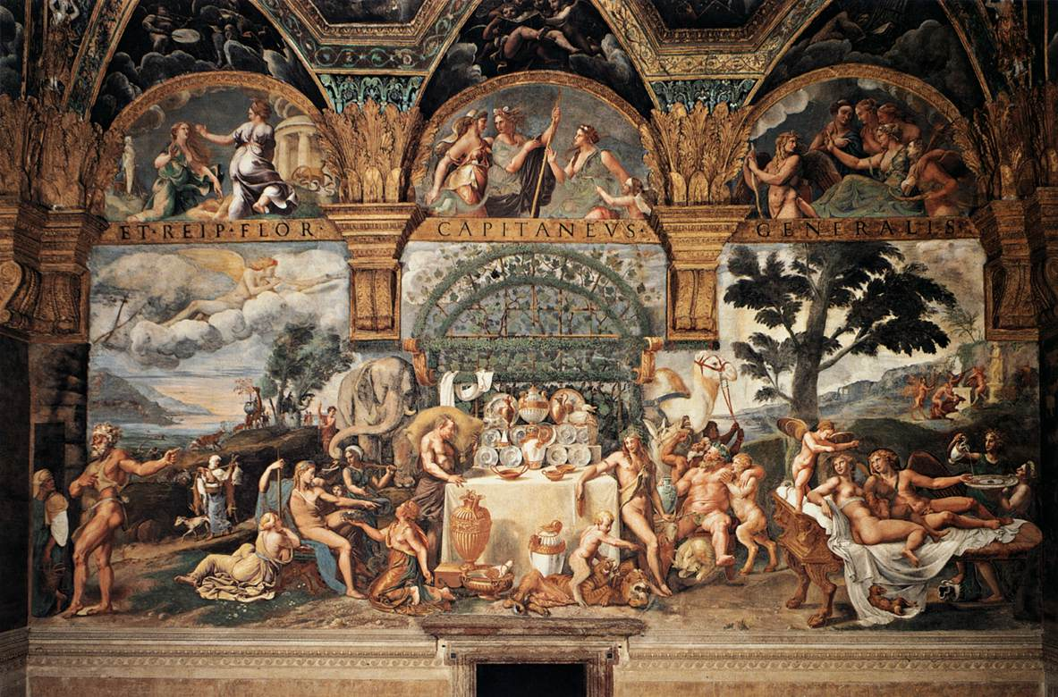 Giulio Romano, Banchetto di Amore e Psiche, affresco in Palazzo Te a Mantova.